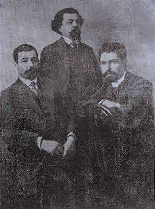 Stepan Şaumyan Ermeni kökenli devrimci, Bolşevik. Bakü Komünü lideri ve Kafkaslar Olağanüstü Komiseri